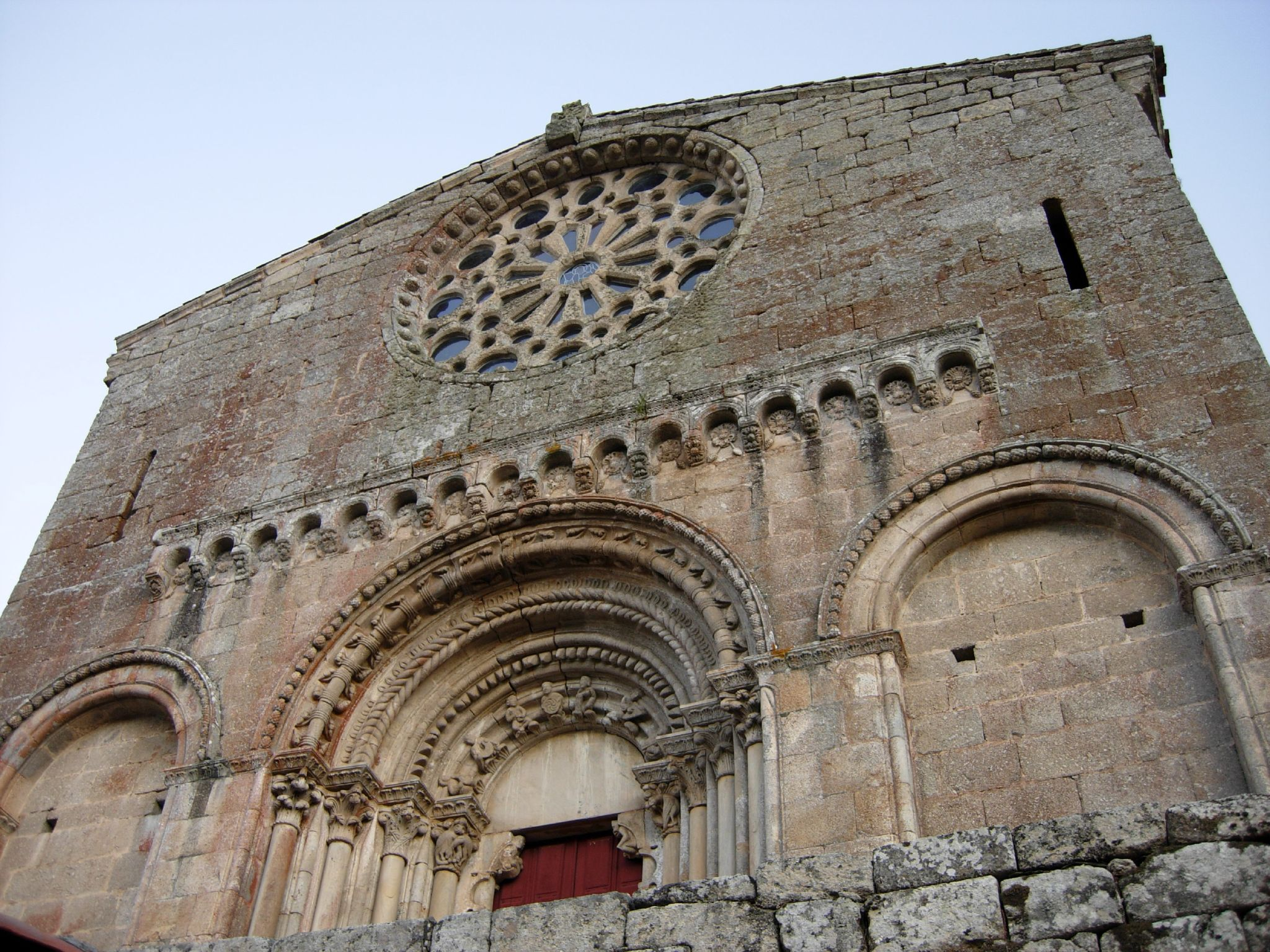 Iglesia de Santo Estevo de Ribas de Miño - O Saviñao - LugoIglesia de Santo Estevo de Ribas de Miño